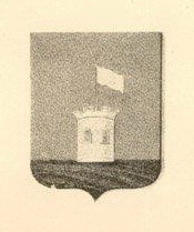 Герб Елисаветградского пикинерного полка русской армии, 1776-1784.